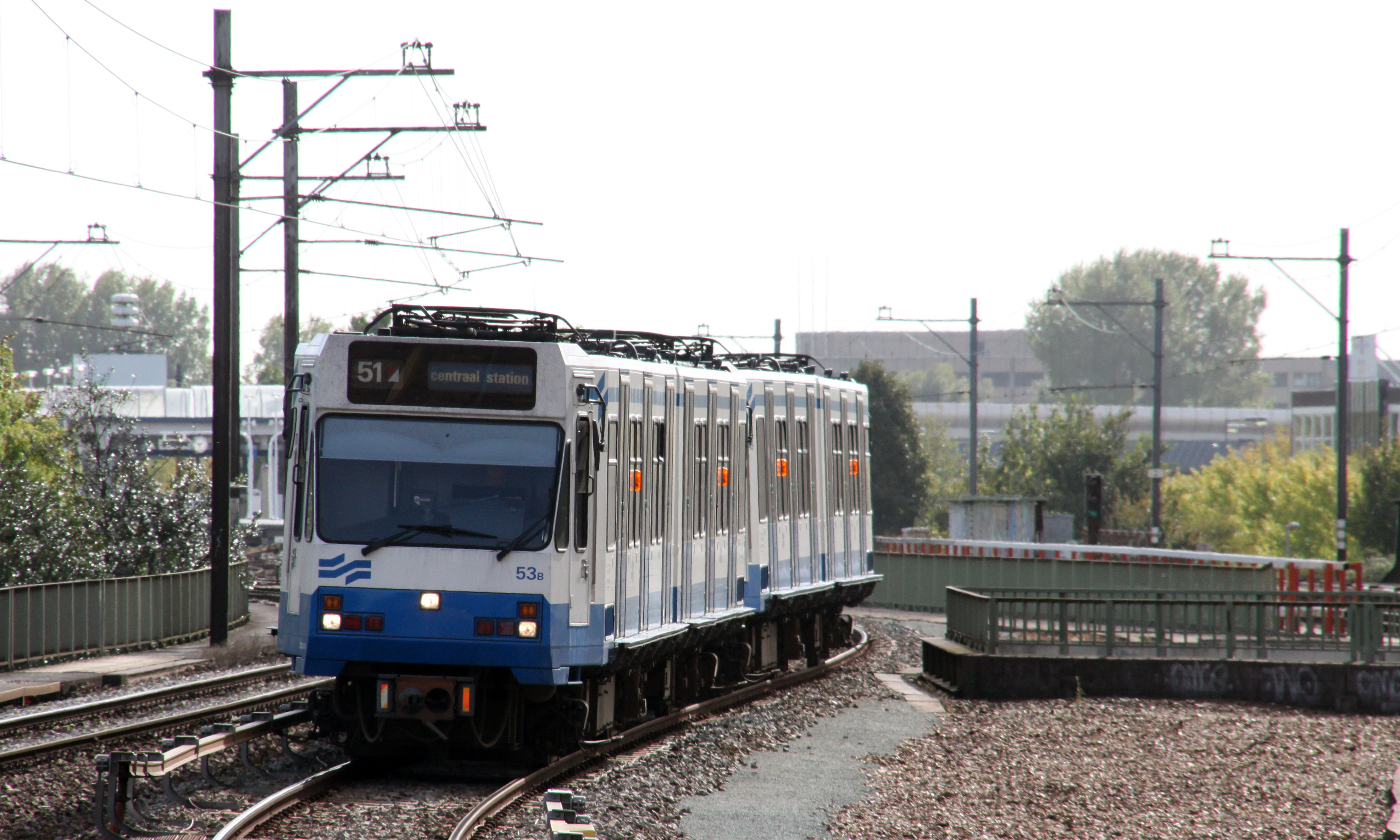 Sneltrammaterieel van GVB Amsterdam te Amsterdam, Amstelstation.